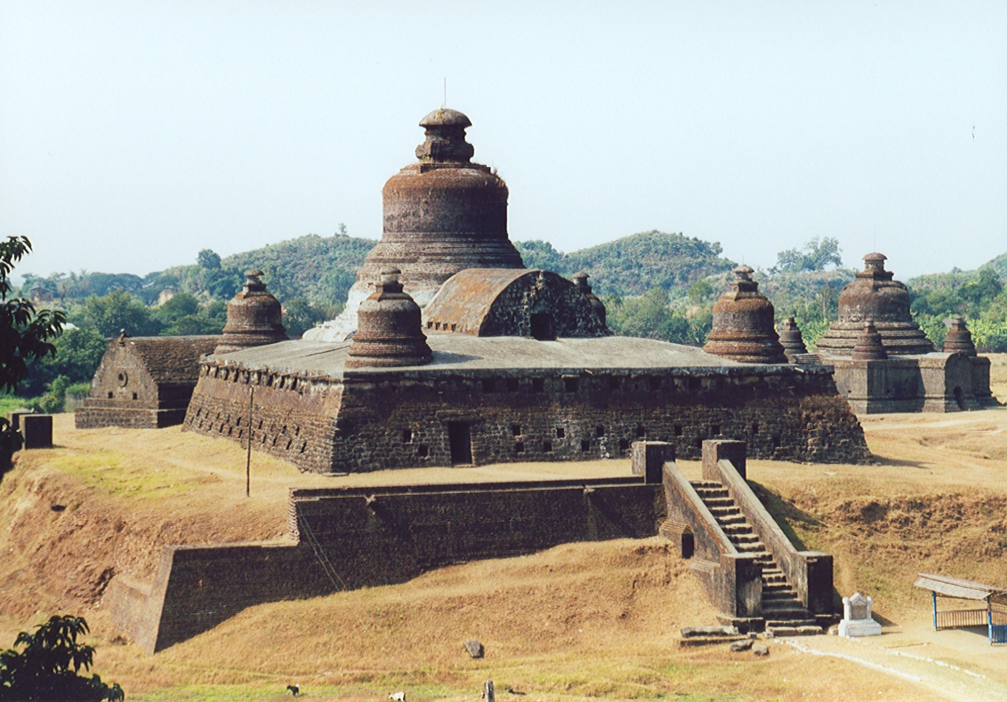 Mrauk U, Dukkanthein (1571 AD)